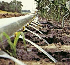 Riego por surcos alimentados por una tuberia de baja presión Autor: Alfredobi; Fecha: 2004